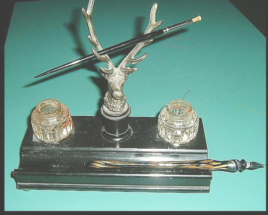 antikes Schreibtischset mit Hirschkopf als Halterablage und 2 Tintenfässchen antique writing set